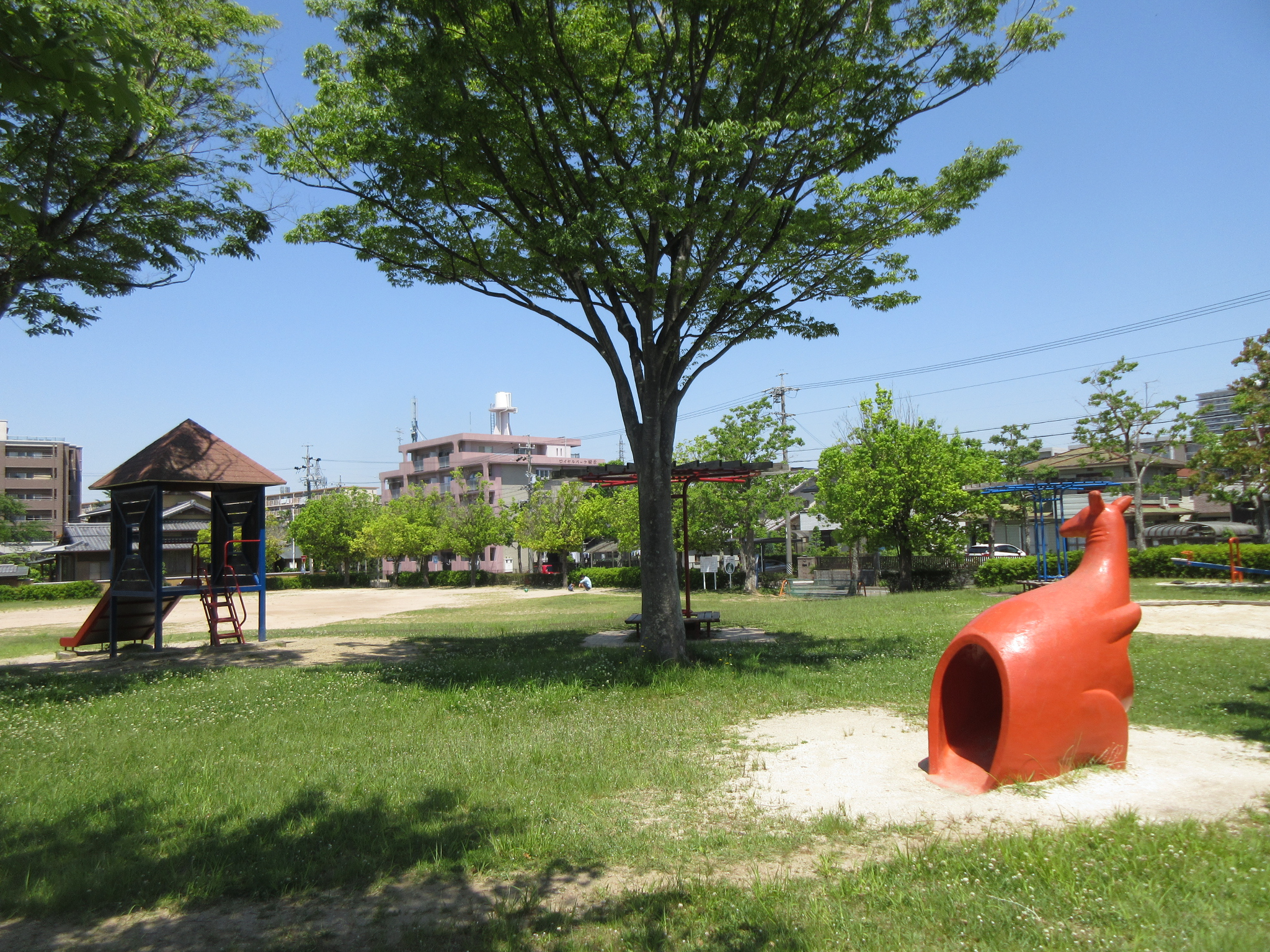 すみれ公園（岡崎市緑丘）